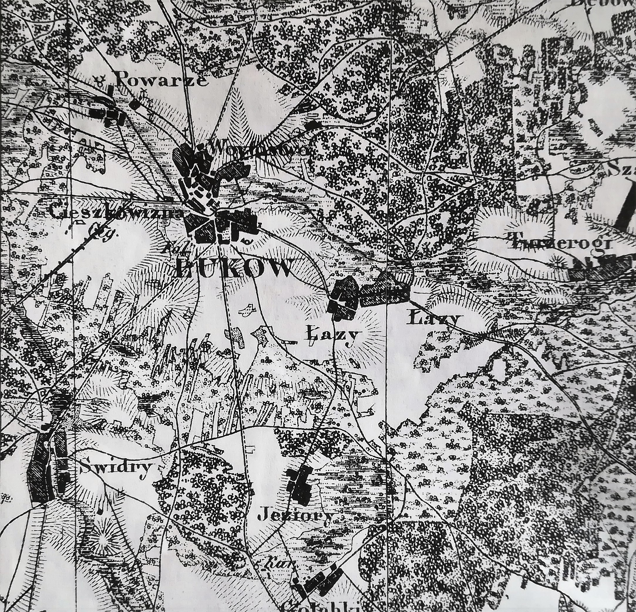 Mapa okolic Łukowa z 1842r.